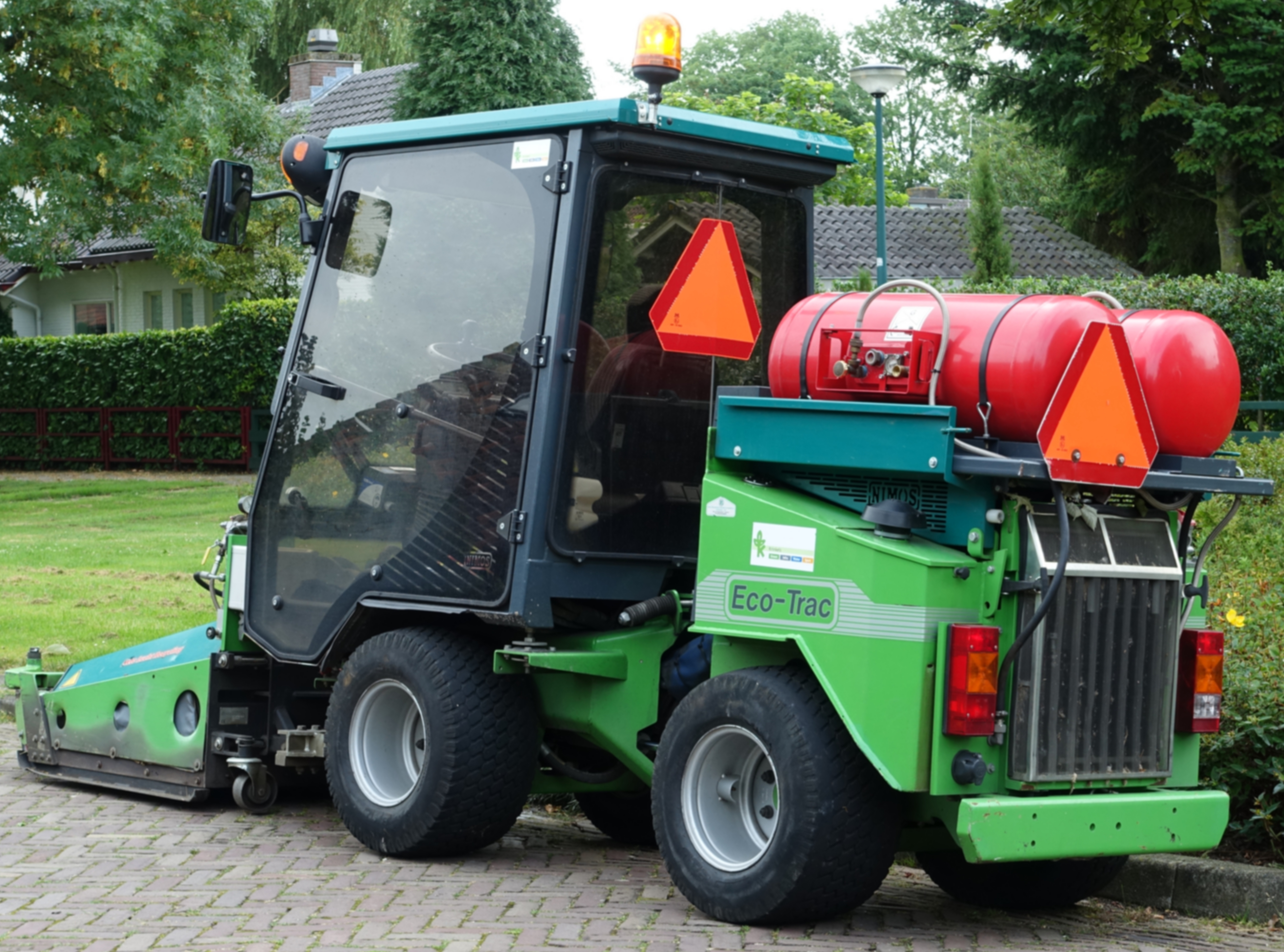 Onkruidbrander met 4 branders die een plaat heet maken